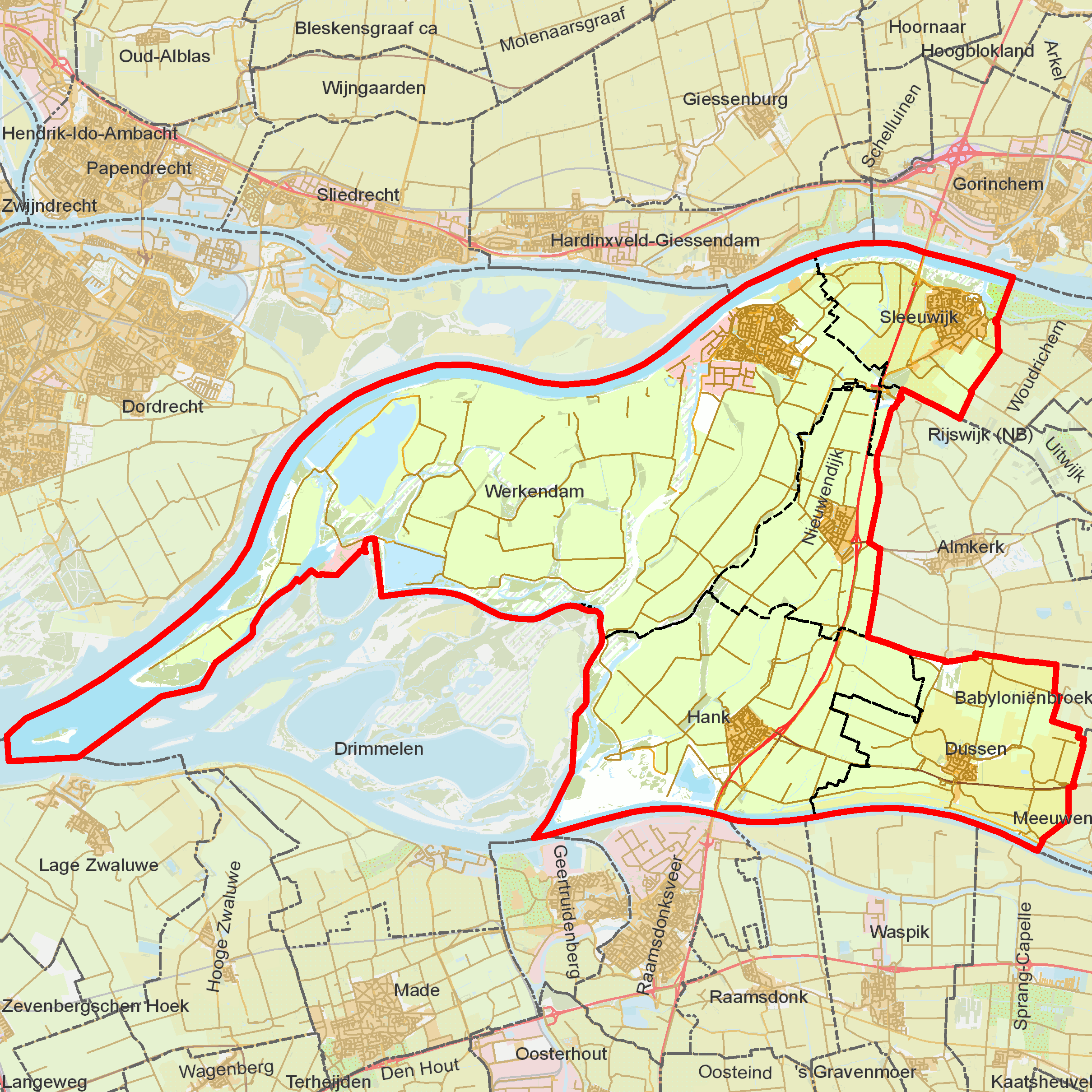 BAG woonplaatsen - Gemeente Werkendam.png